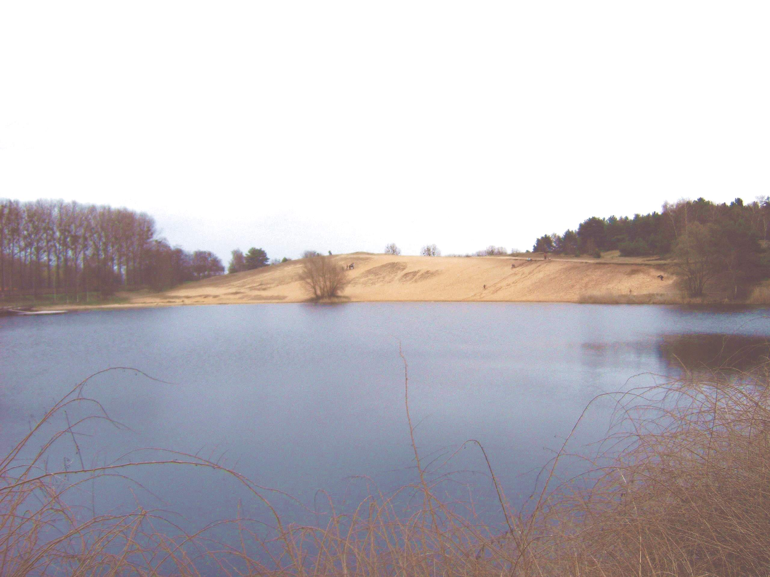 Kulk in Gommern, Deutschland (See) Bild aufgenommen am 16.4.2006 Urheber: Olaf Meister